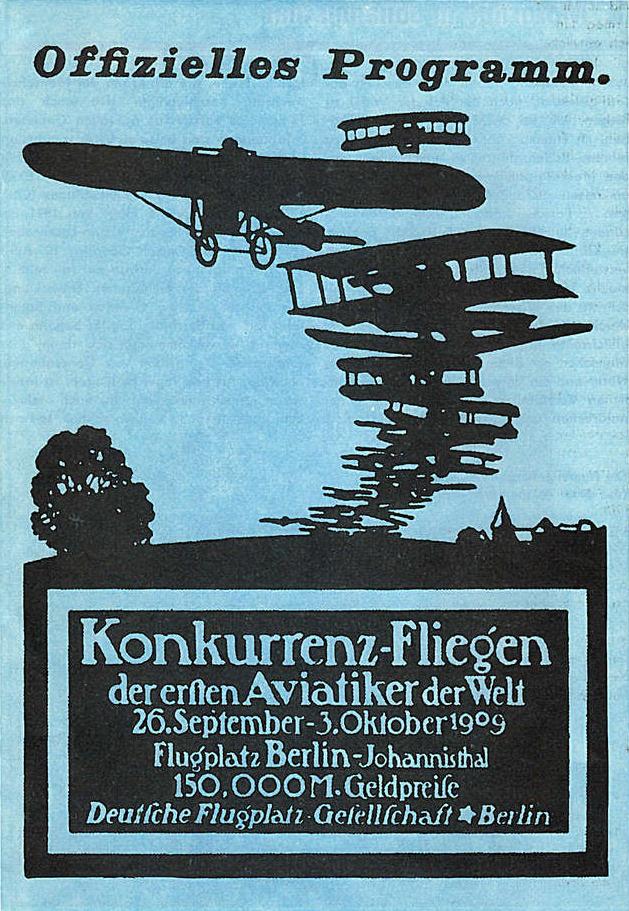 Deckblatt des Programms zum Konkurrenz-Fliegen der Deutschen Flugplatz Gesellschaft ab dem 26. September 1909 auf dem Flugplatz Johannisthal